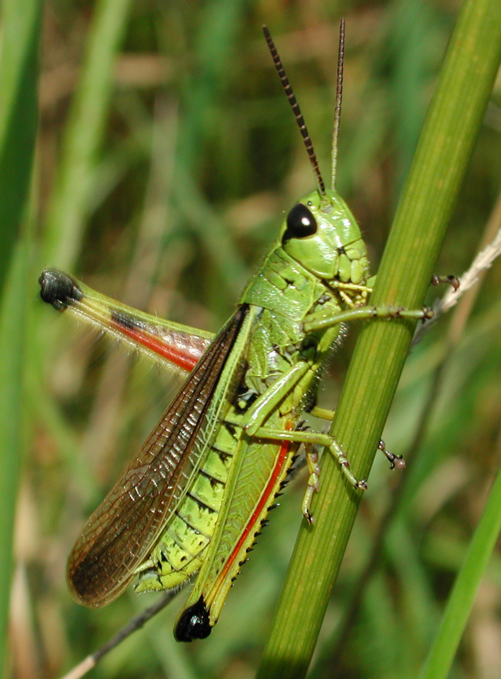 Stethophyma grossum, m., clicking, Sumpfschrecke, Kirchwerder, Hamburg, Germany